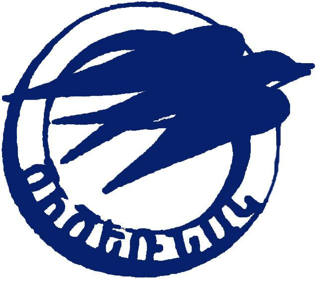 Lori, Vanadzor, Cicernak